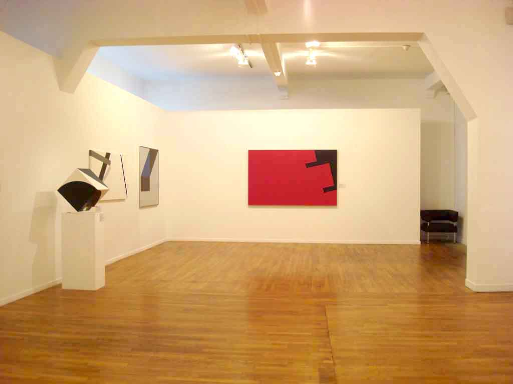 Präsentation im Rahmen einer Ausstellung 2009